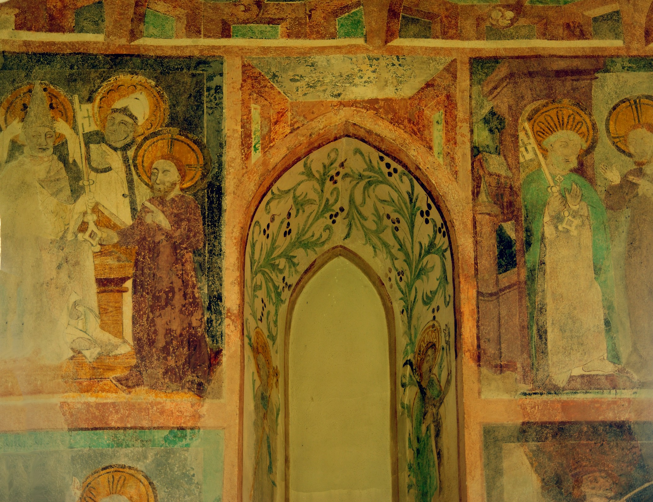 Peterskirche Blansingen: Petrusdarstellungen